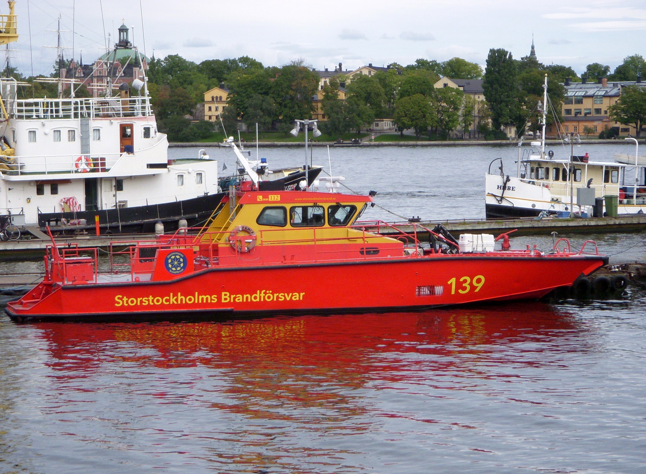 Stockholms brandförsvars fartyg 139 i Stockholm vid Slussen